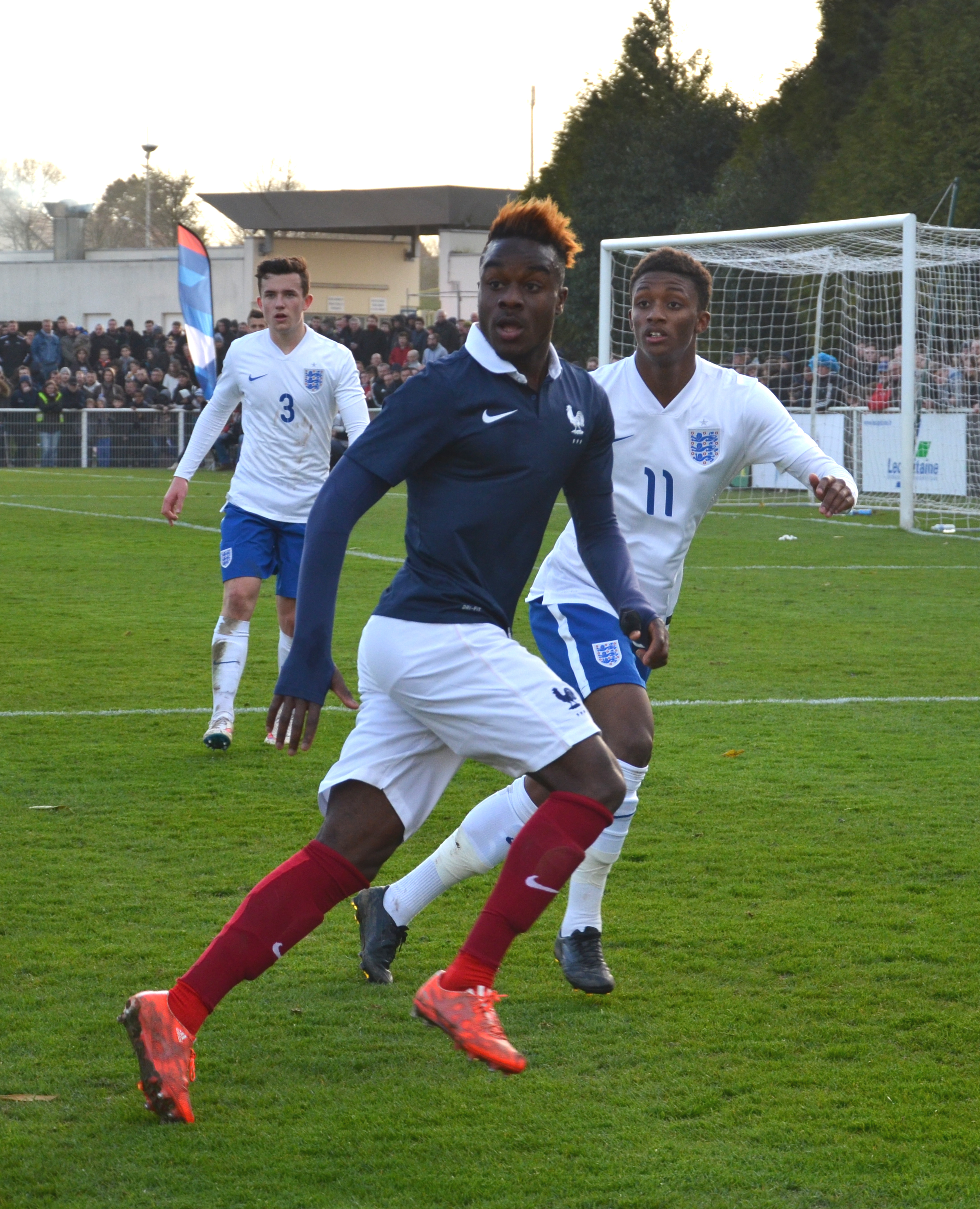 Photographie prise lors du match opposant la France à l'Angleterre pour les qualifications du championnat d'Europe de football des moins de 19 ans 2015 au stade Louis-Villemer de Saint-Lô le 31 mars 2015. Ici, Maxwell Cornet devant Demarai Gray et Ben Chilwell